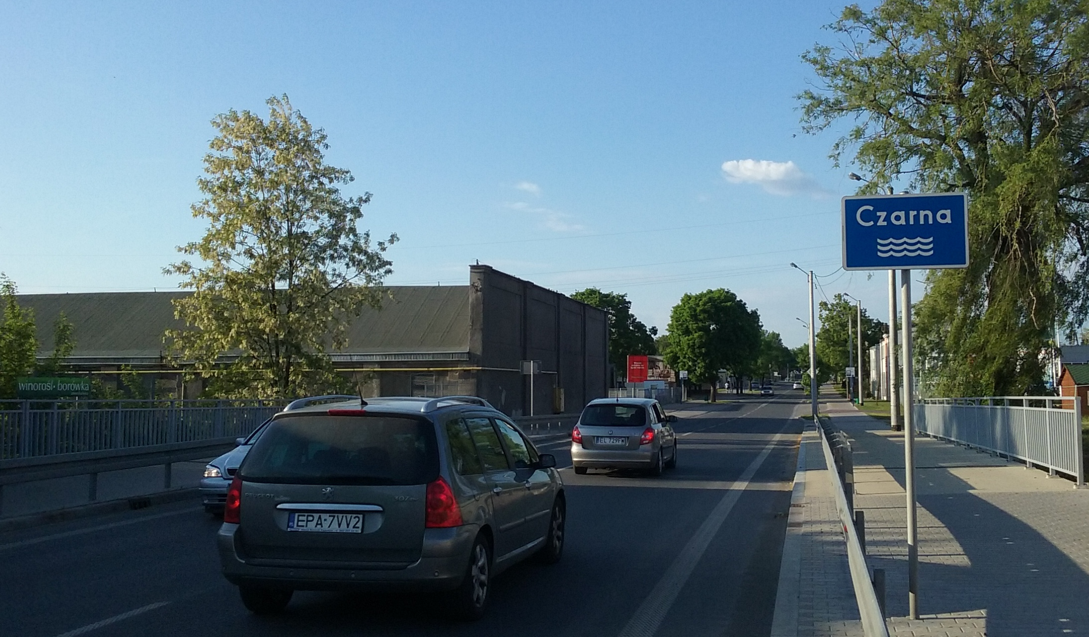 Most na rzece Czarnej, ulica Warszawska, Tomaszów Mazowiecki, wojewodztwo łódzkie